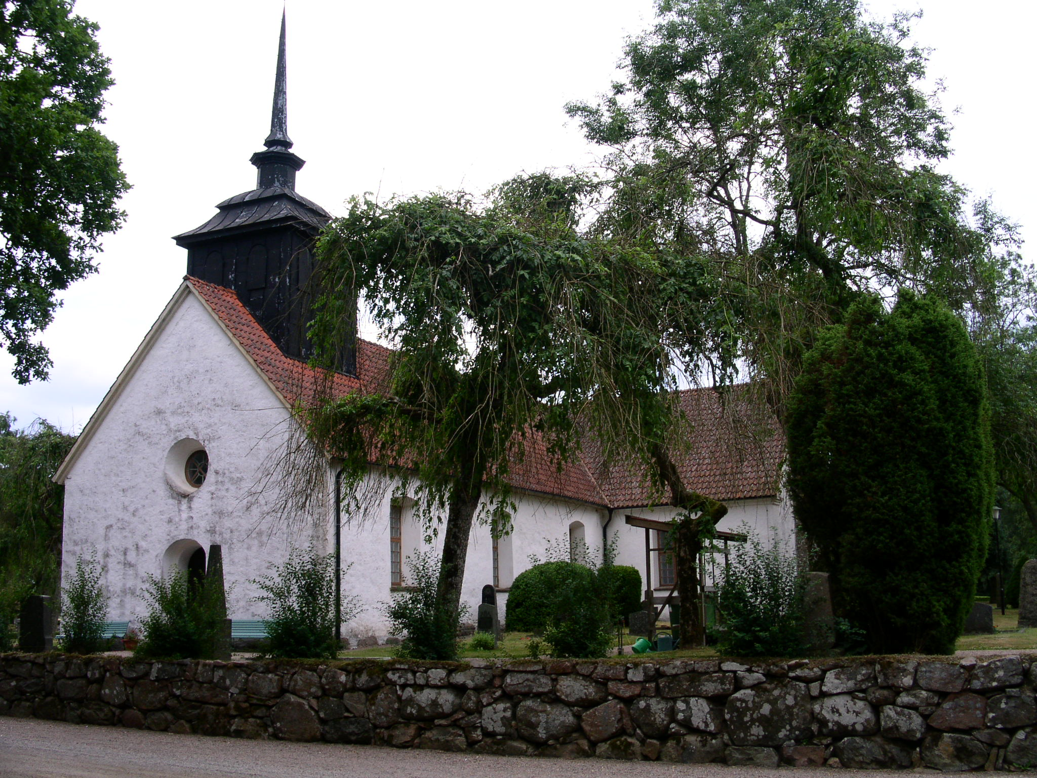 Tåssjö kyrka, Lunds stift